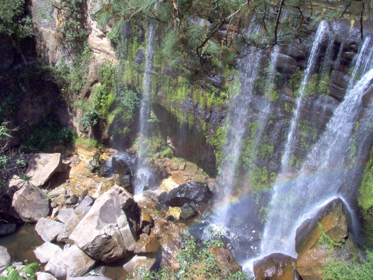 Casacada Sn Pedro Atmatla Autor: Christopher Ramírez Carreto